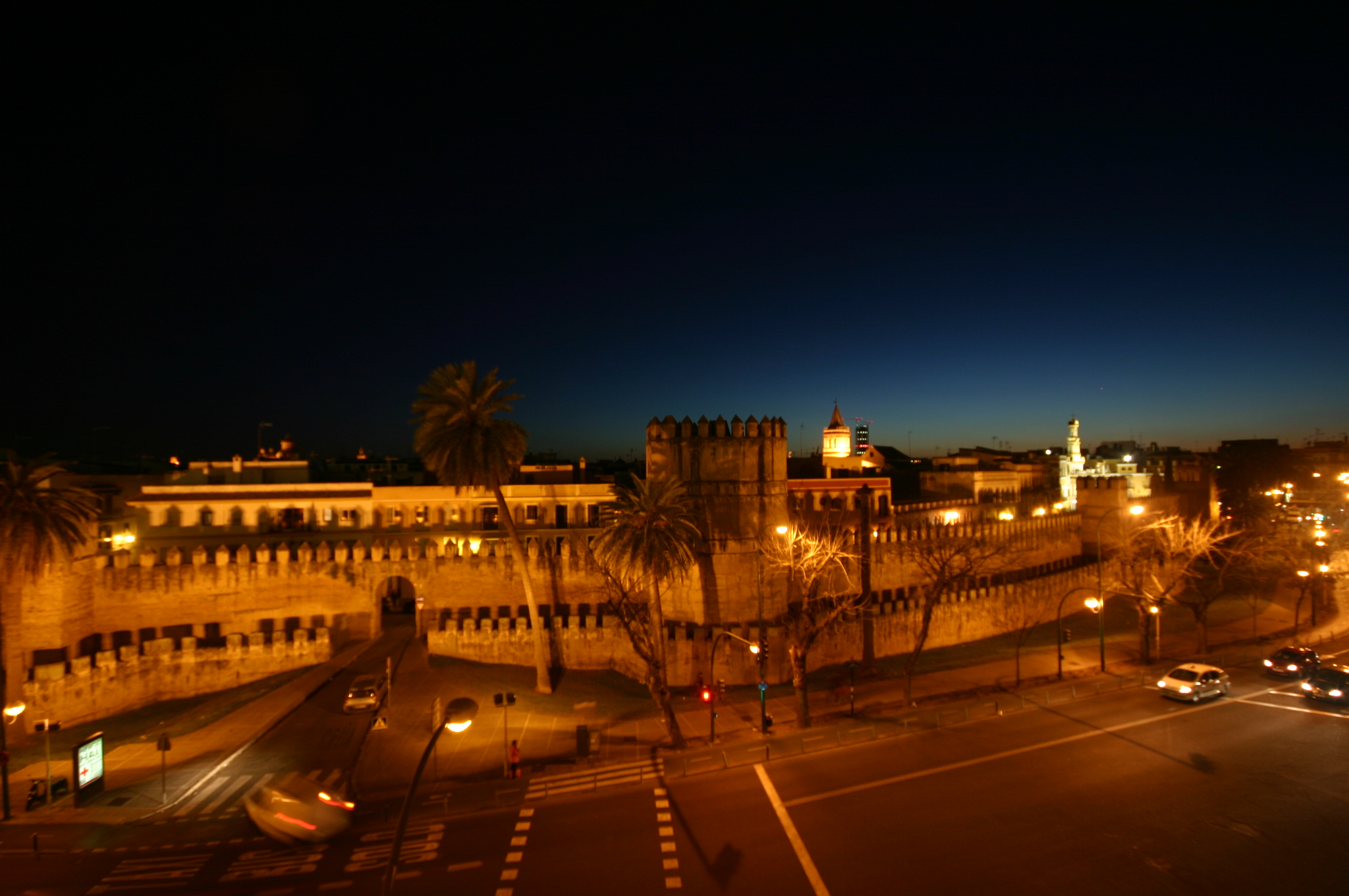 Vista Noturna